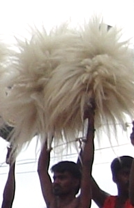 ഉയർത്തിപ്പിടിച്ചിരിക്കുന്ന വെൺചാമരങ്ങൾ